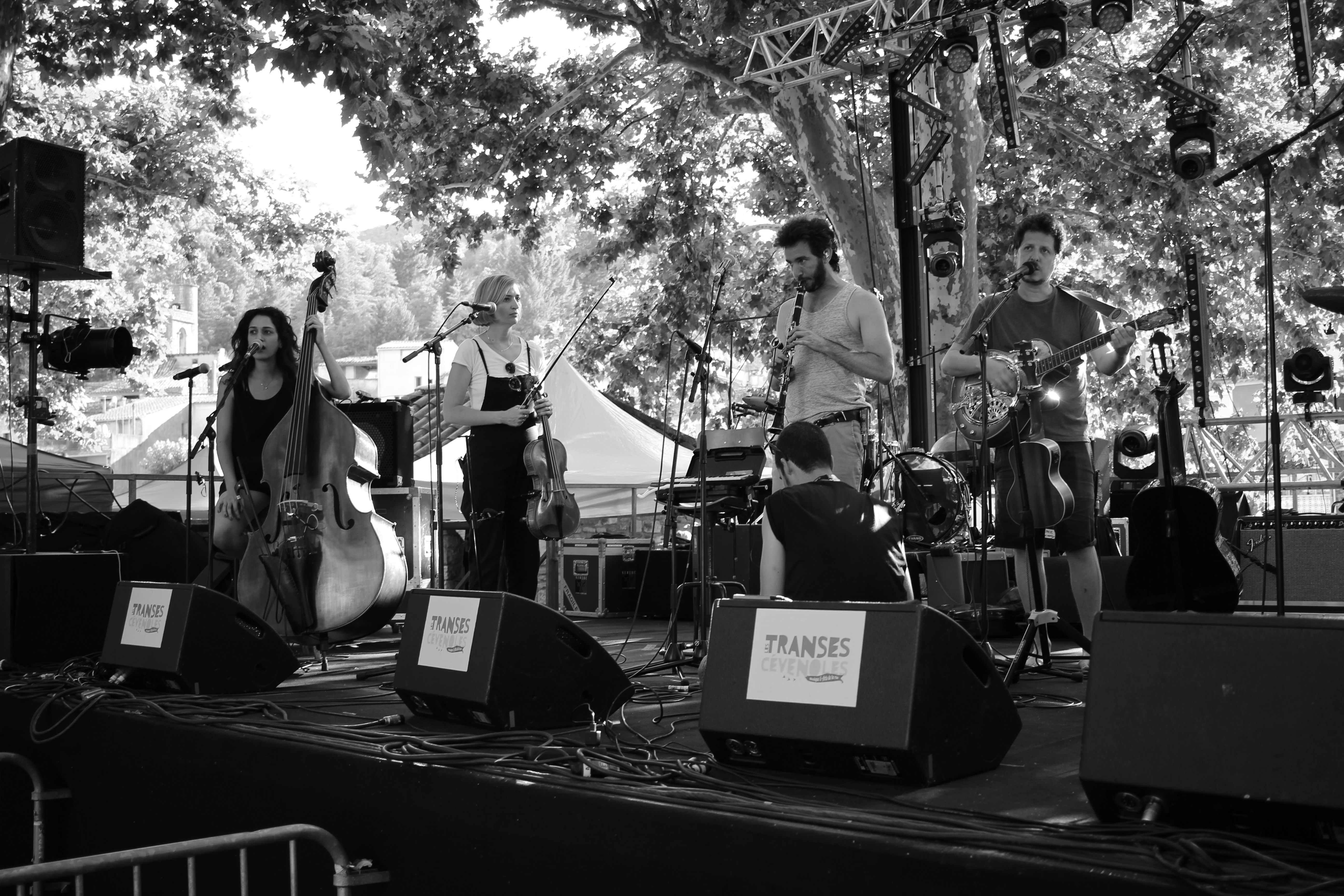 23 juil. 2017 au Festival Transes Cévénoles à Sumène, France.